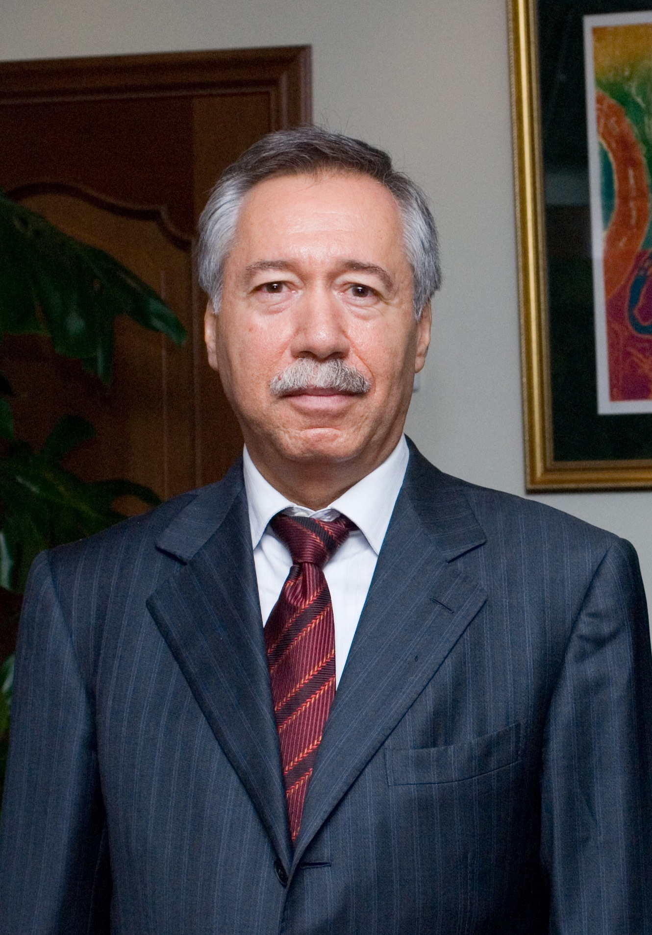 Михаил Витальевич Комиссар — председатель совета директоров, генеральный директор информационного агентства «Интерфакс».